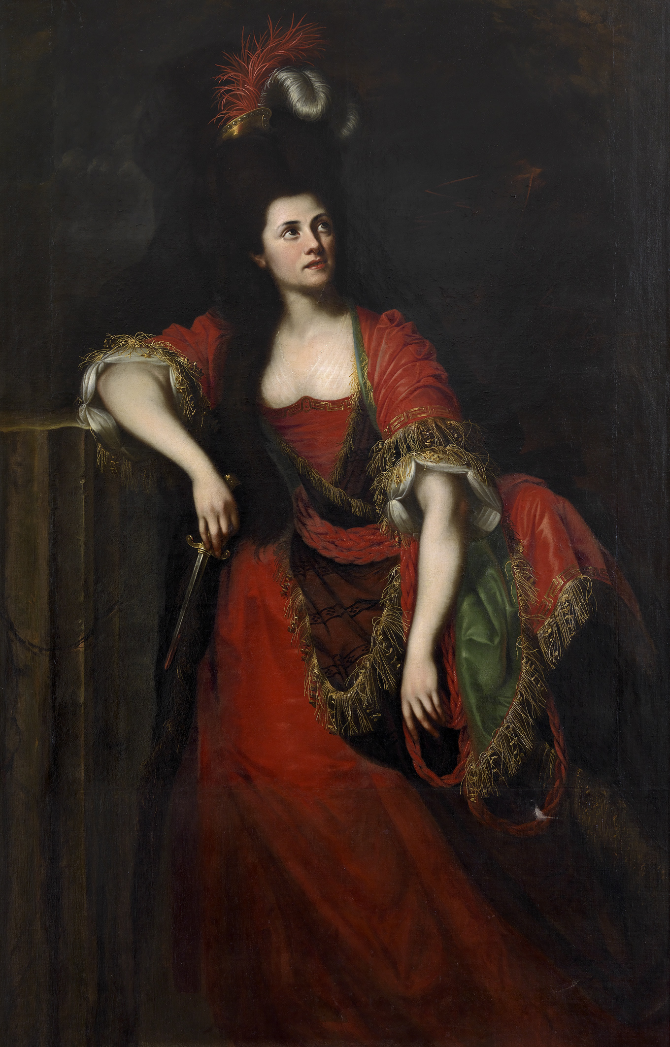 Johanna Sacco als "Medea"title QS:P1476,de:"Johanna Sacco als "Medea"" label QS:Lde,"Johanna Sacco als "Medea""